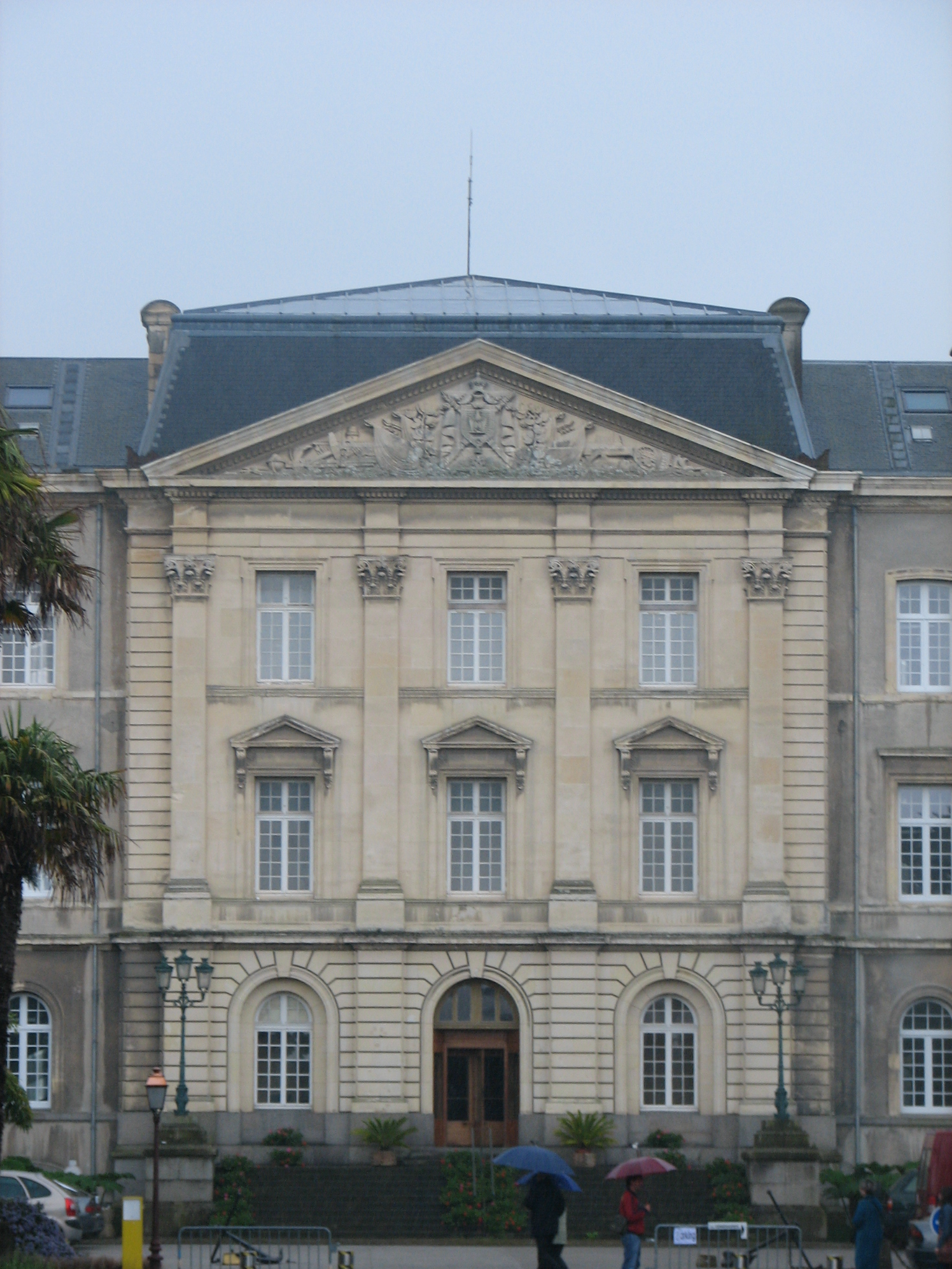 Facade de l'Hôpital des Armées à Cherbourg